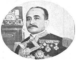 Retrato de Ramón Auñón y Villalón, recogido en la revista española Nuevo Mundo.